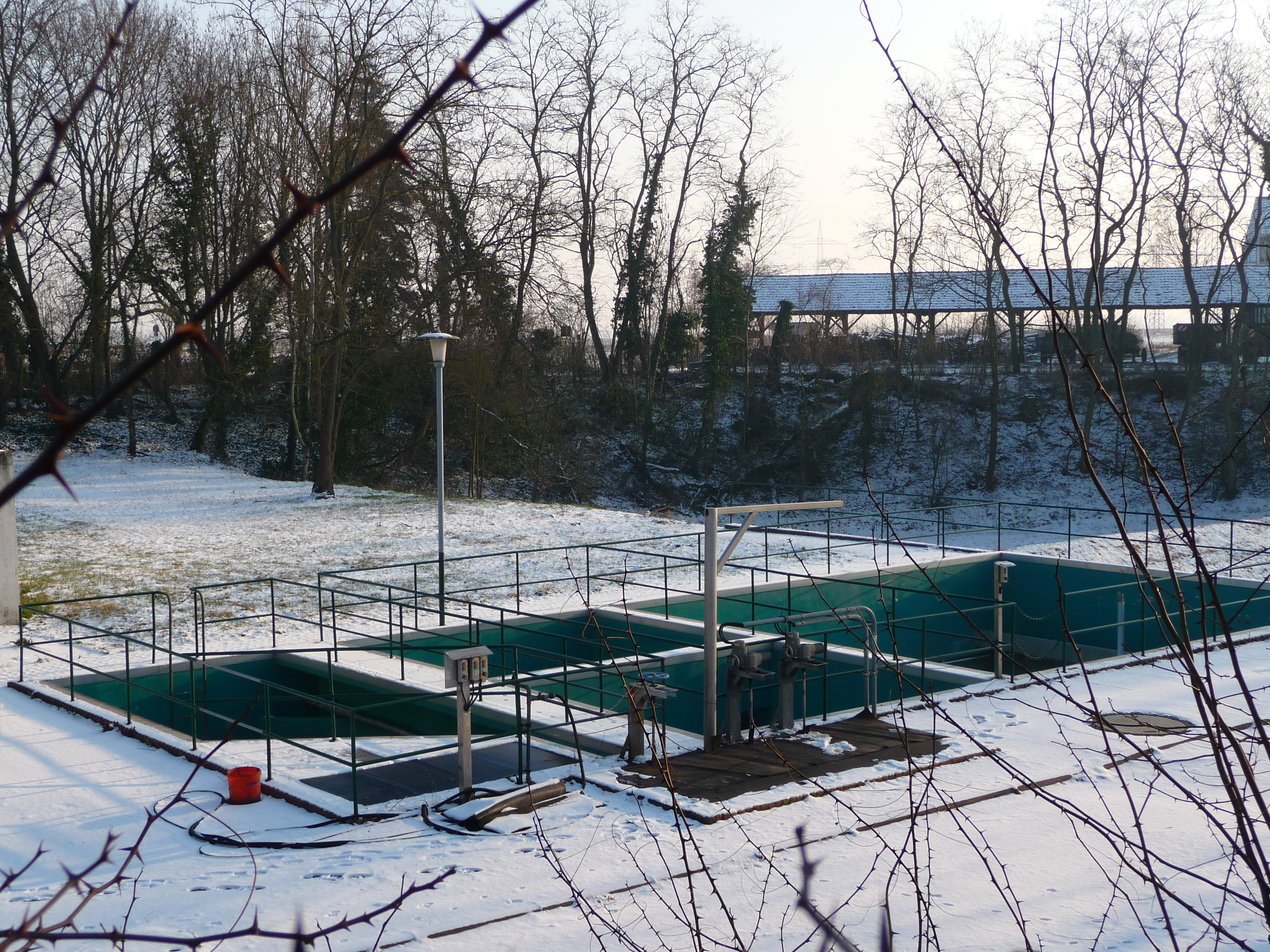 Heidelberg (Grenzhof) - städtische Kläranlage